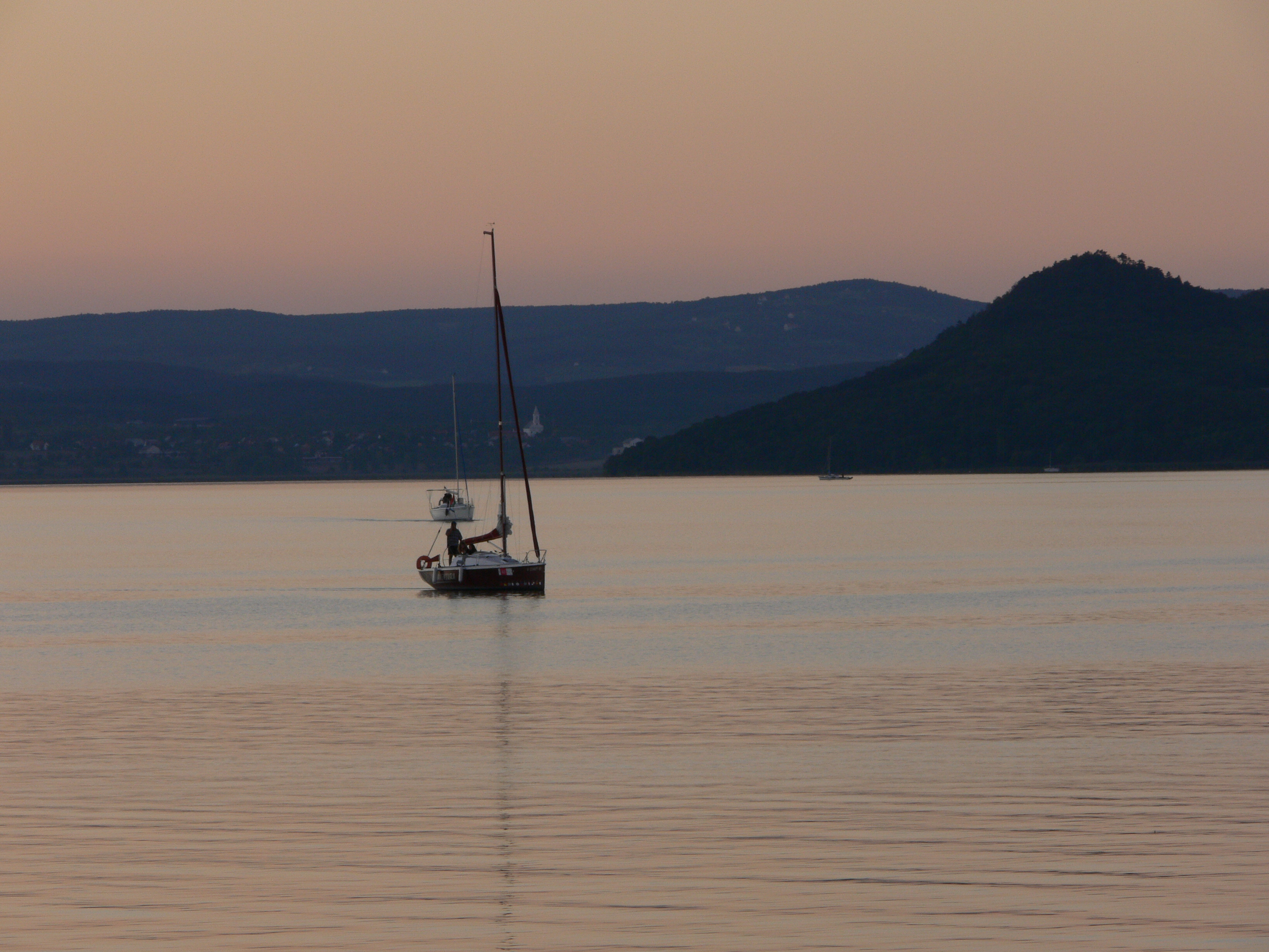 Balatonföldvár, balatoni látkép